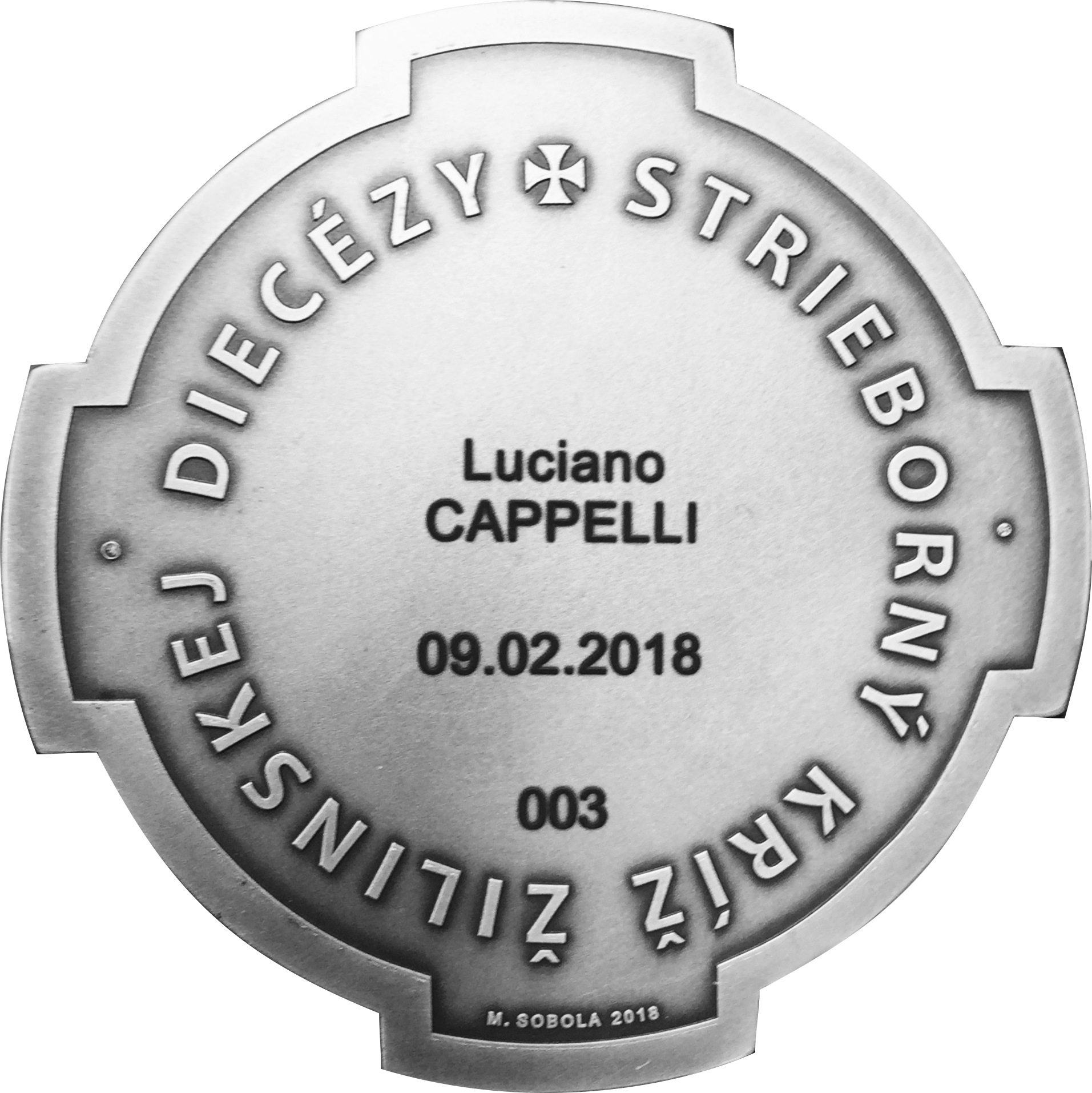 Vyznamenanie Žilinskej diecézy zadná strana